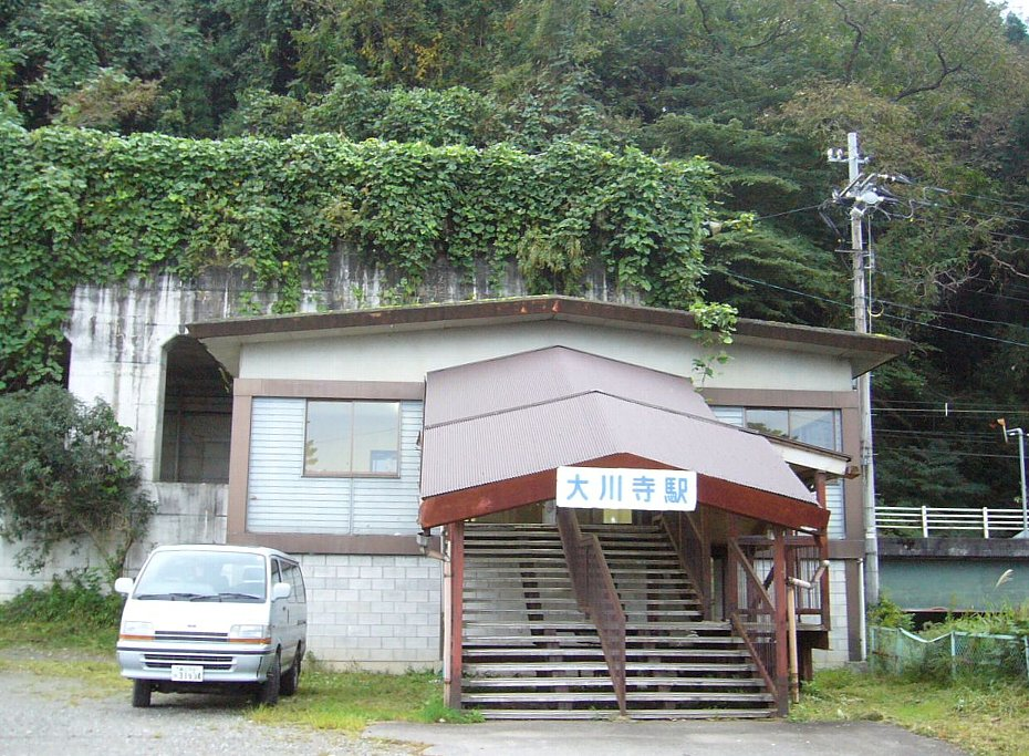 富山地方鉄道大川寺駅 駅入口 2006年10月13日 Bakkai撮影